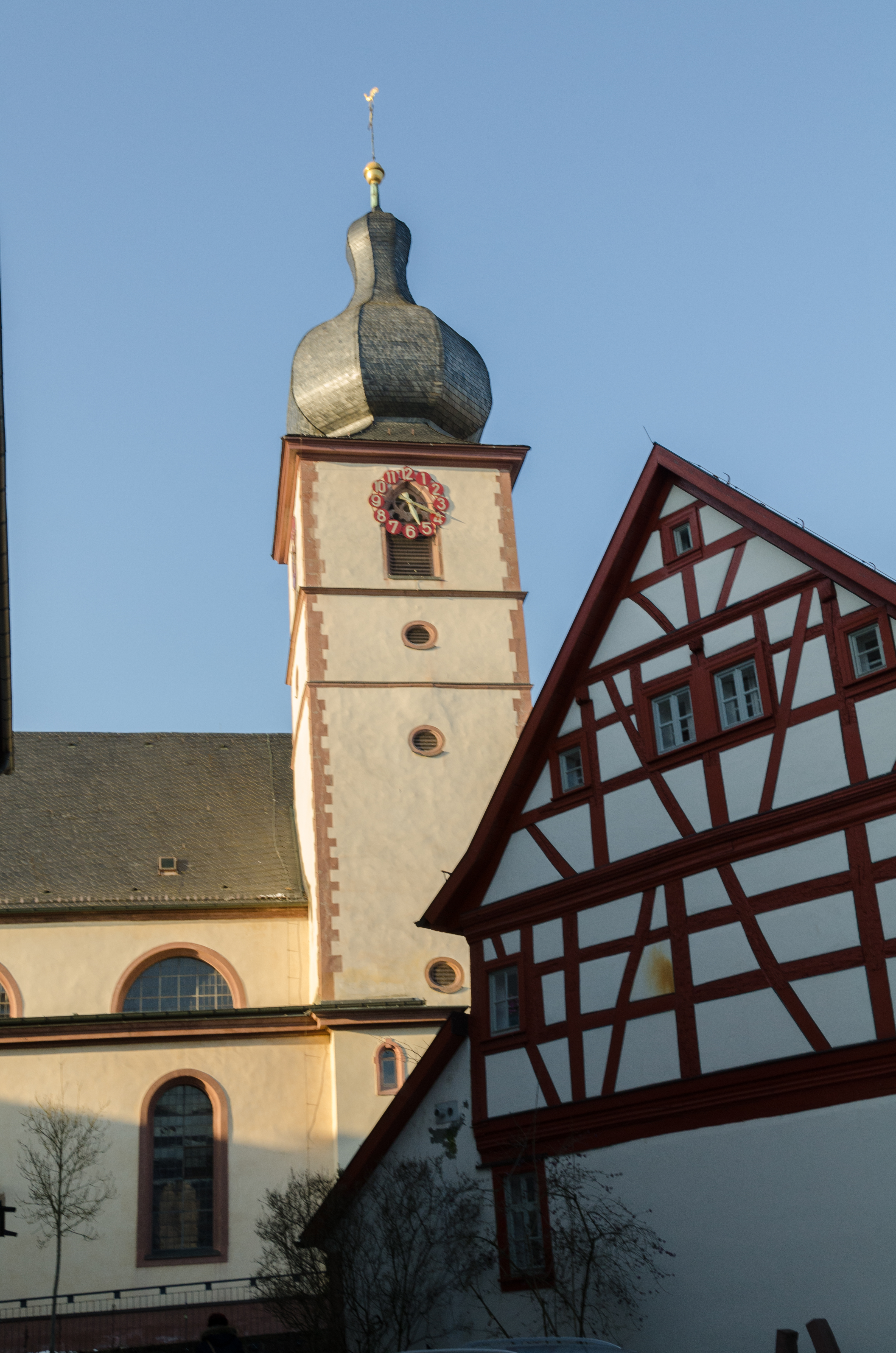 Marktheidenfeld, Kath. Pfarrkirche St. Laurentius